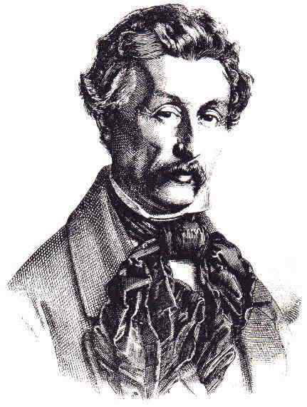 Der deutsche Erfinder Carl Baunscheidt (1809–1873)